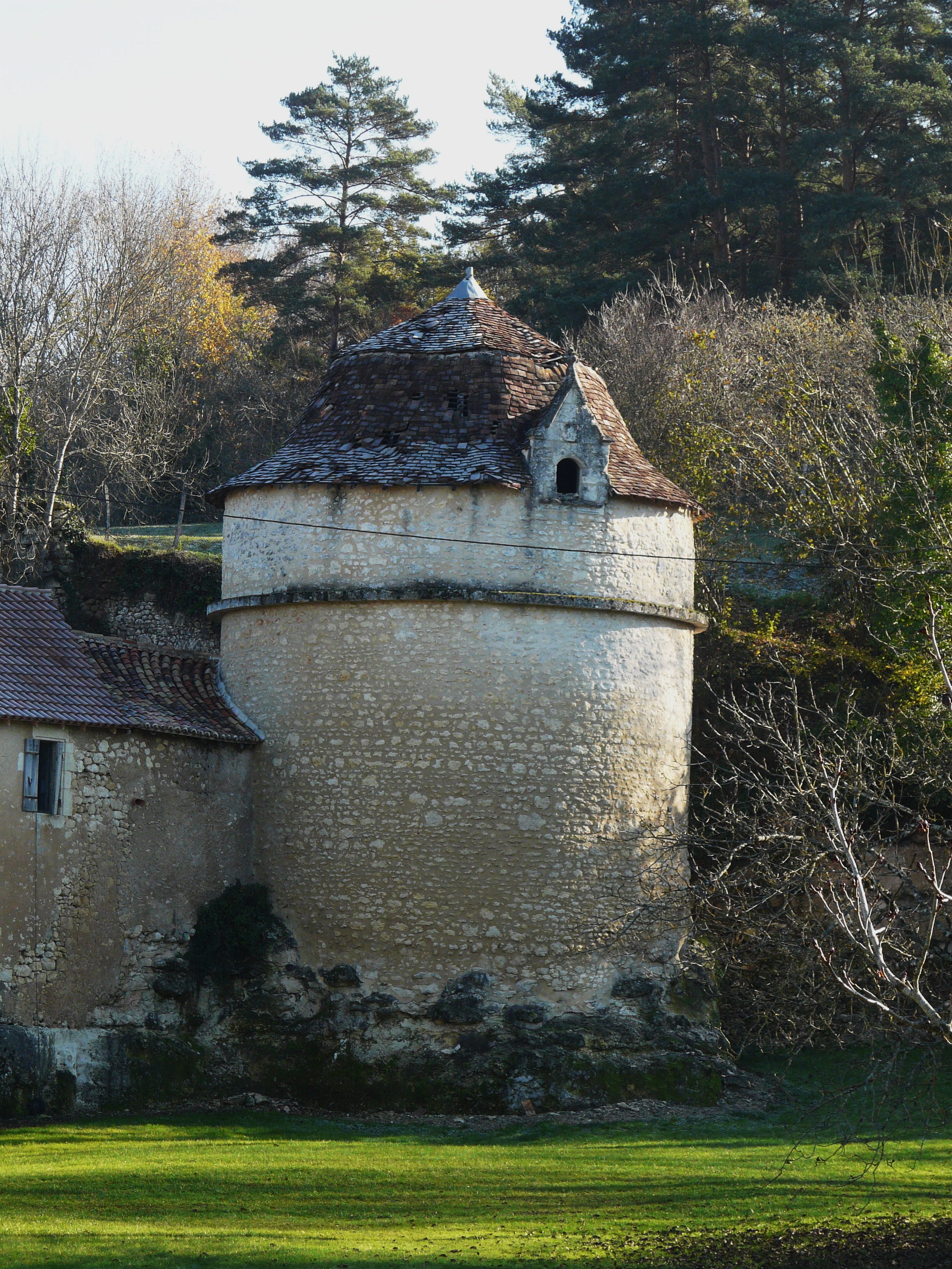 Pigeonnier du château de Jaure, Dordogne, France.